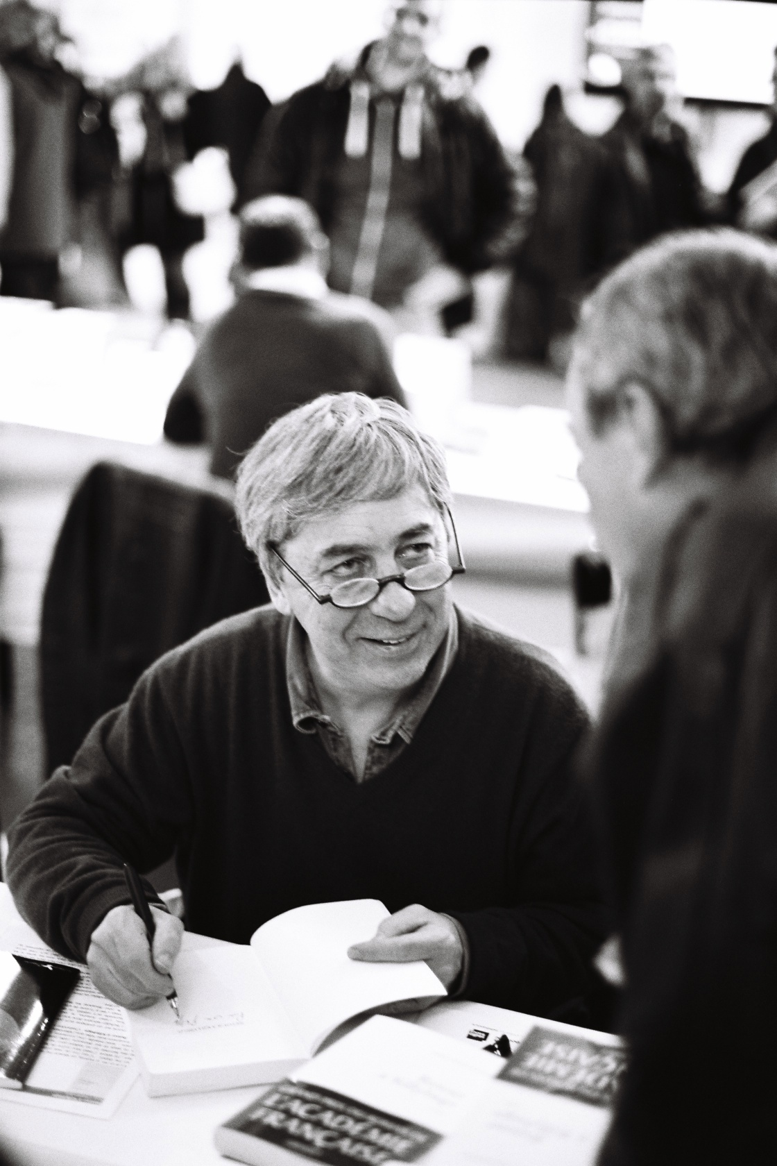 Sorj Chalandon au salon du livre Radio France, 26 novembre 2011